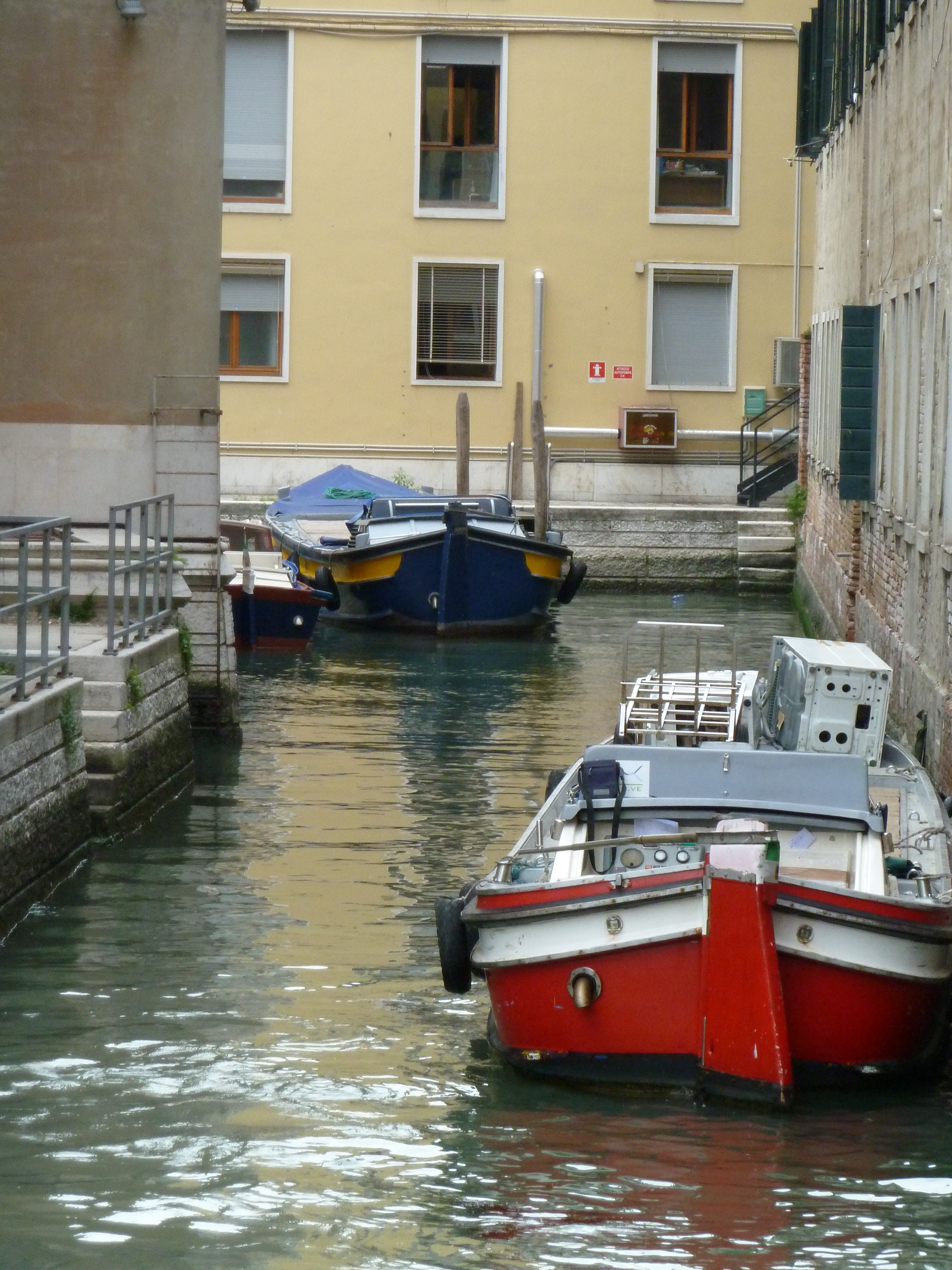 Rio de le Bote (Venice)